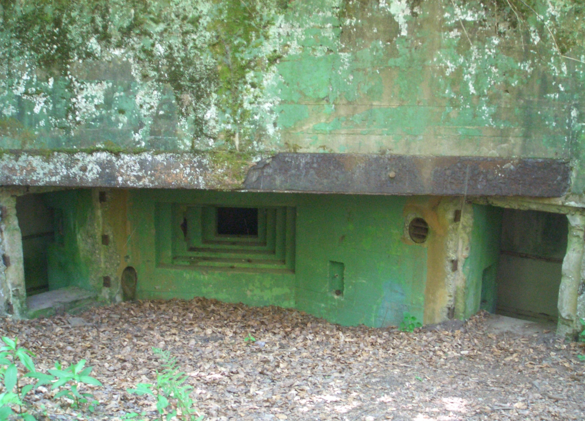 Hofseite des Bunkers 131 auf dem Buhlert in der Nordeifel. Der Bunker ist ein Regelbautyp 10.